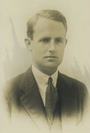 Willem Ruys werd geboren in Rotterdam op 25 augustus 1894 en was de zoon van reder Bernardus Ewoud Ruijs en Wilhelmina Petronella van Hoboken. Willem Ruys werd aan het begin van de oorlog directeur van het scheepvaartbedrijf Rotterdamsche Lloyd, maar heeft de Tweede Wereldoorlog niet overleefd. Hij behoorde tot de eerste groep gijzelaars die door de Duitsers bij wijze van represaille werd gefusilleerd, 15 augustus 1942.